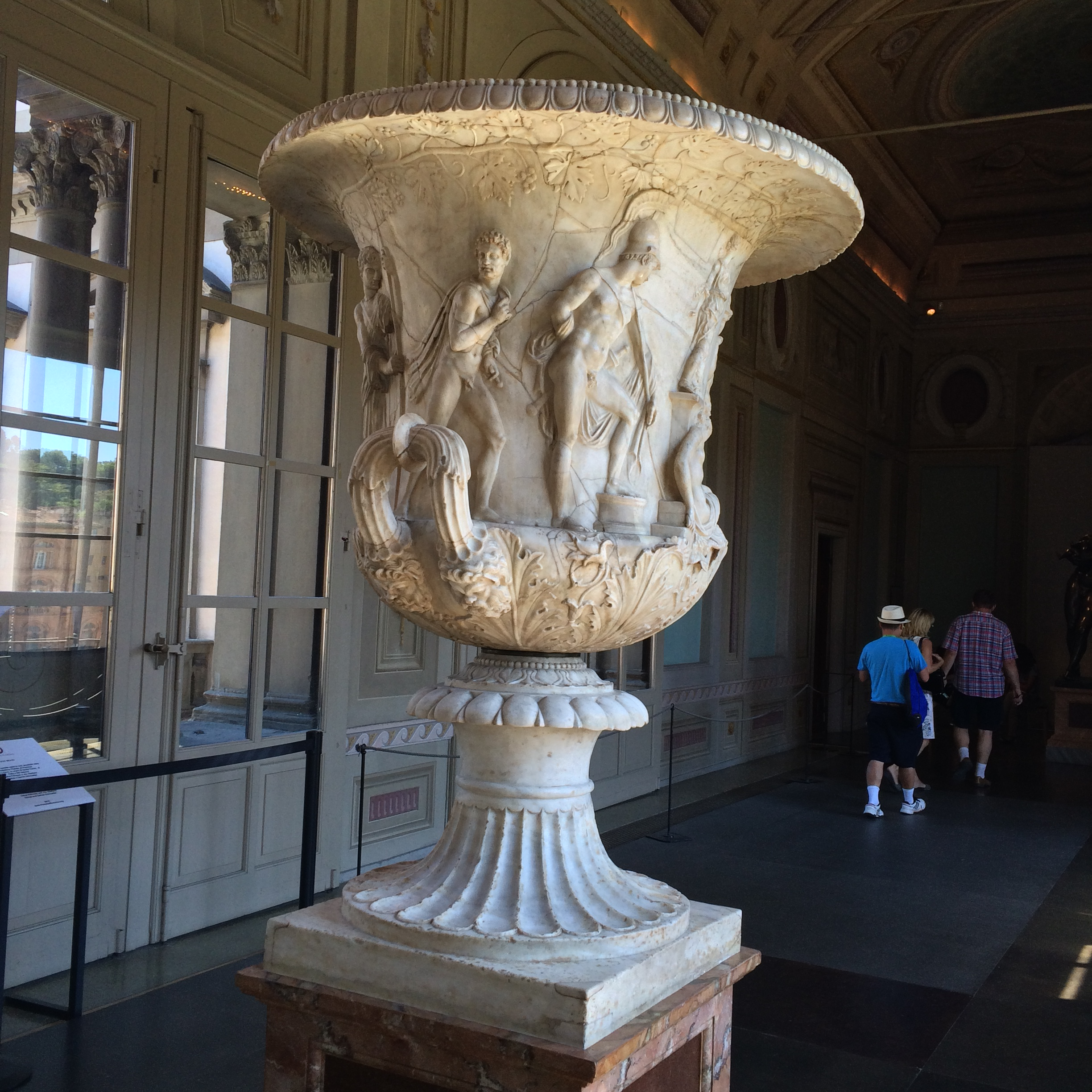 Gallerie des Offices Florence